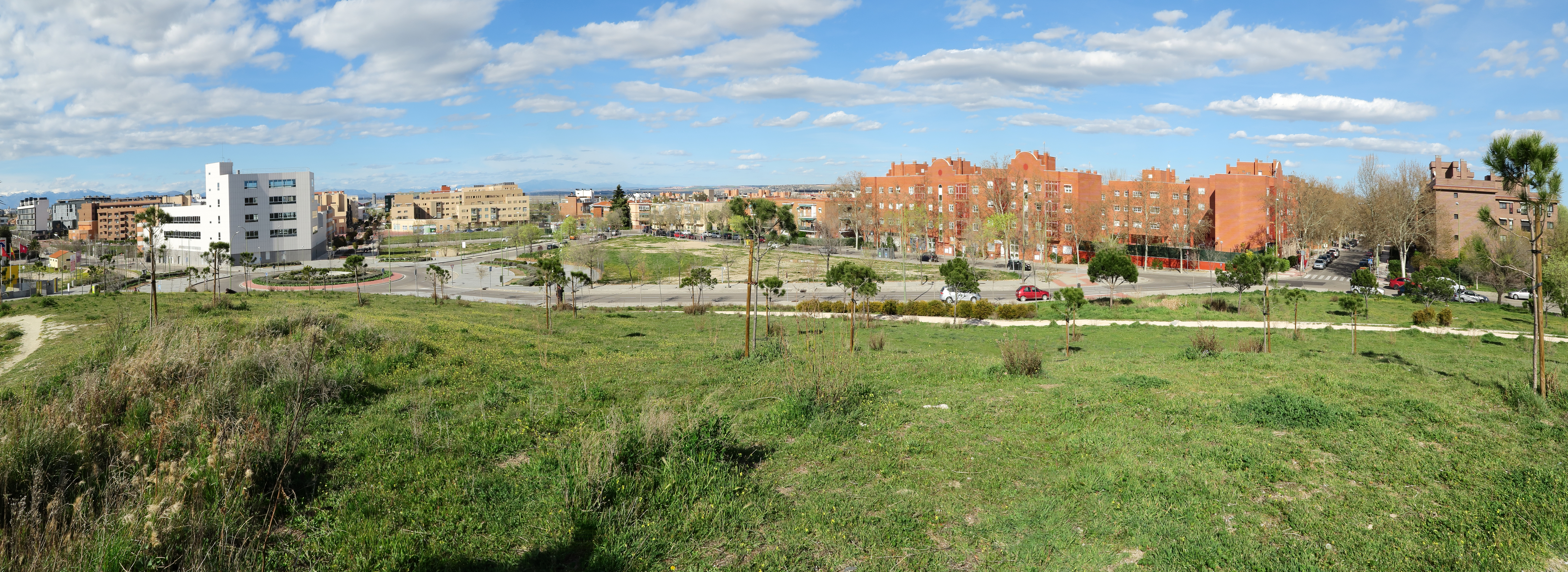 Timón (Madrid), panorámica